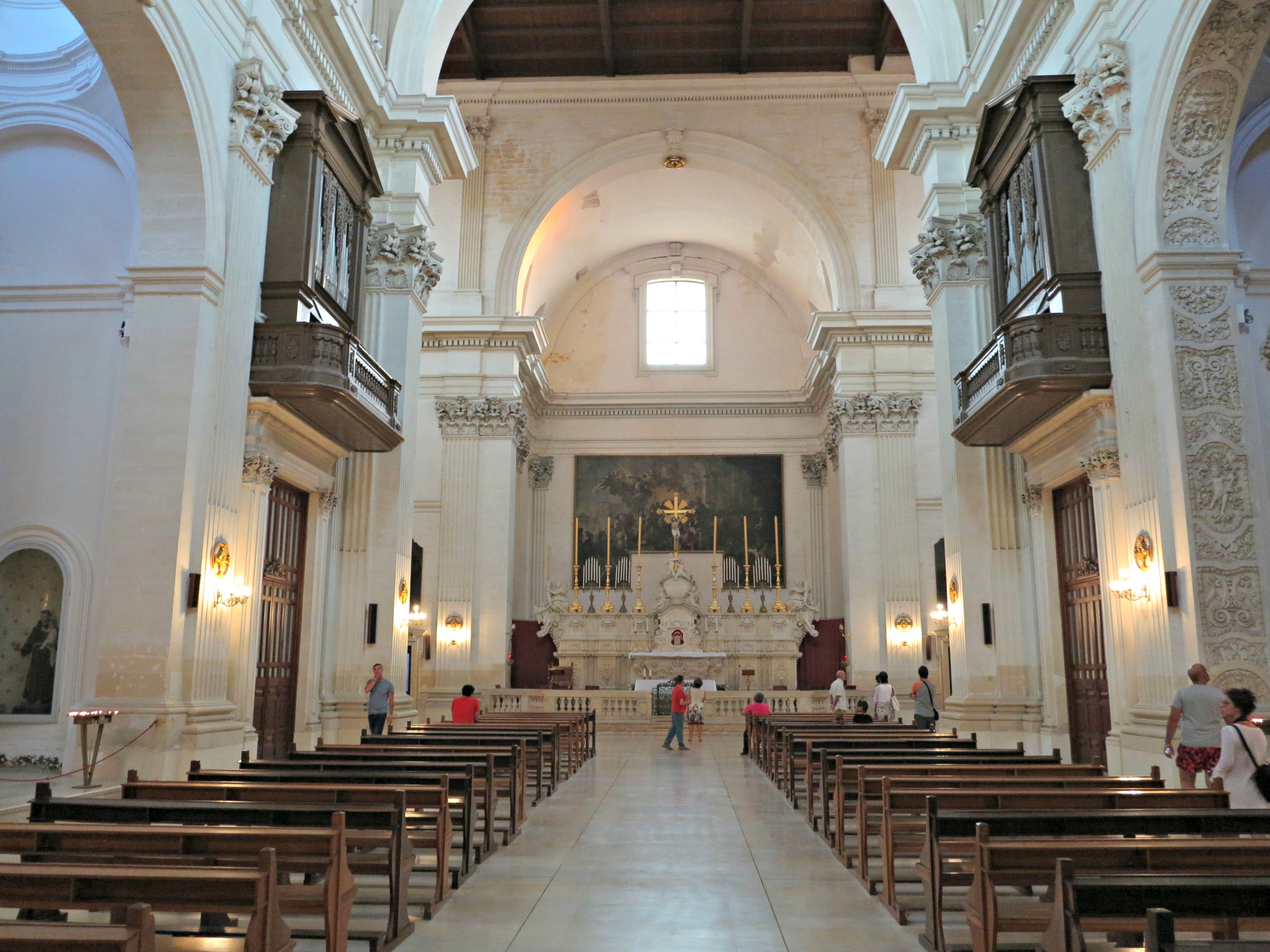 Chiesa di Sant'Irene This is a photo of a monument which is part of cultural heritage of Italy.